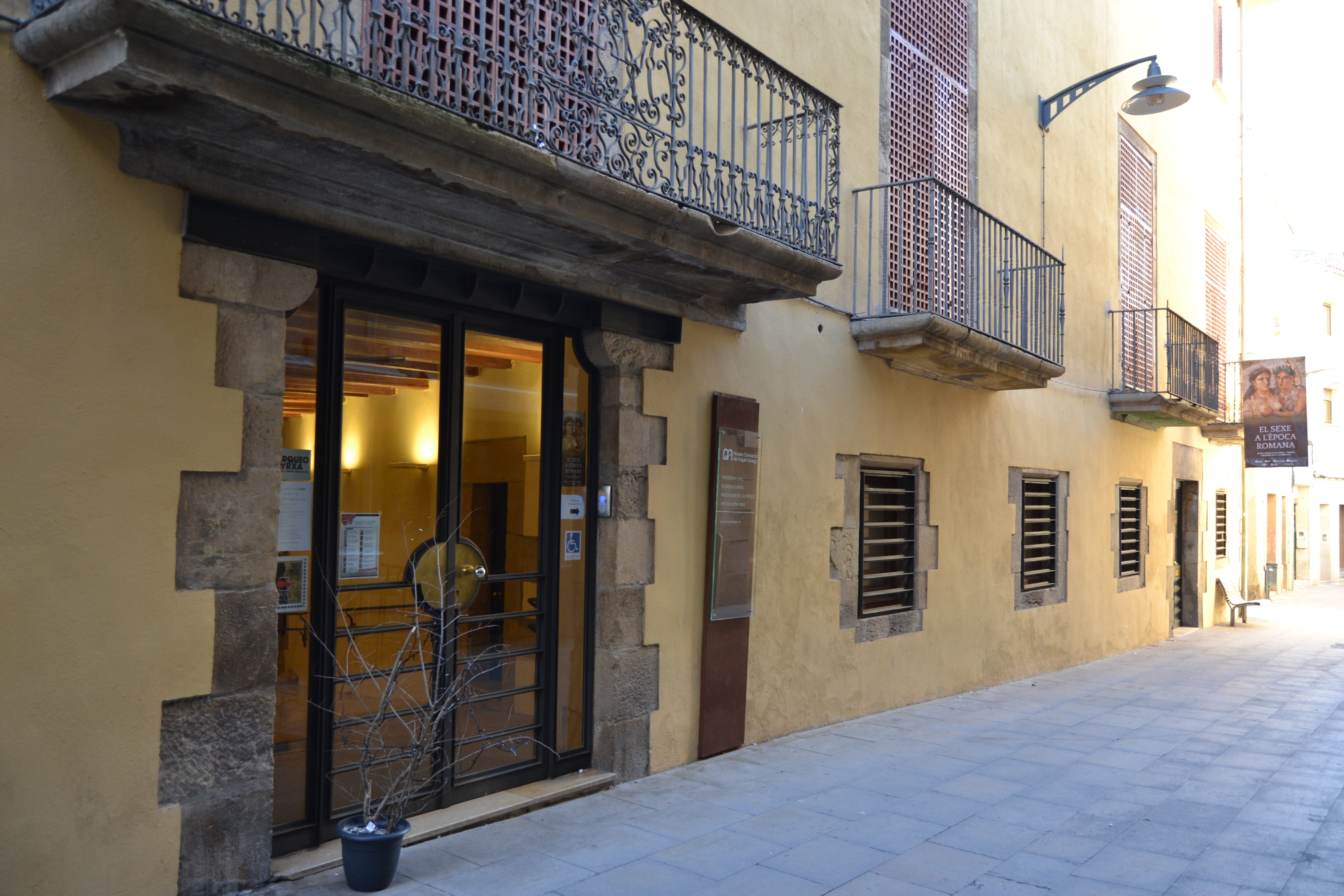 Tàrrega